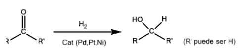 Aldehido mota baten erreakzioa